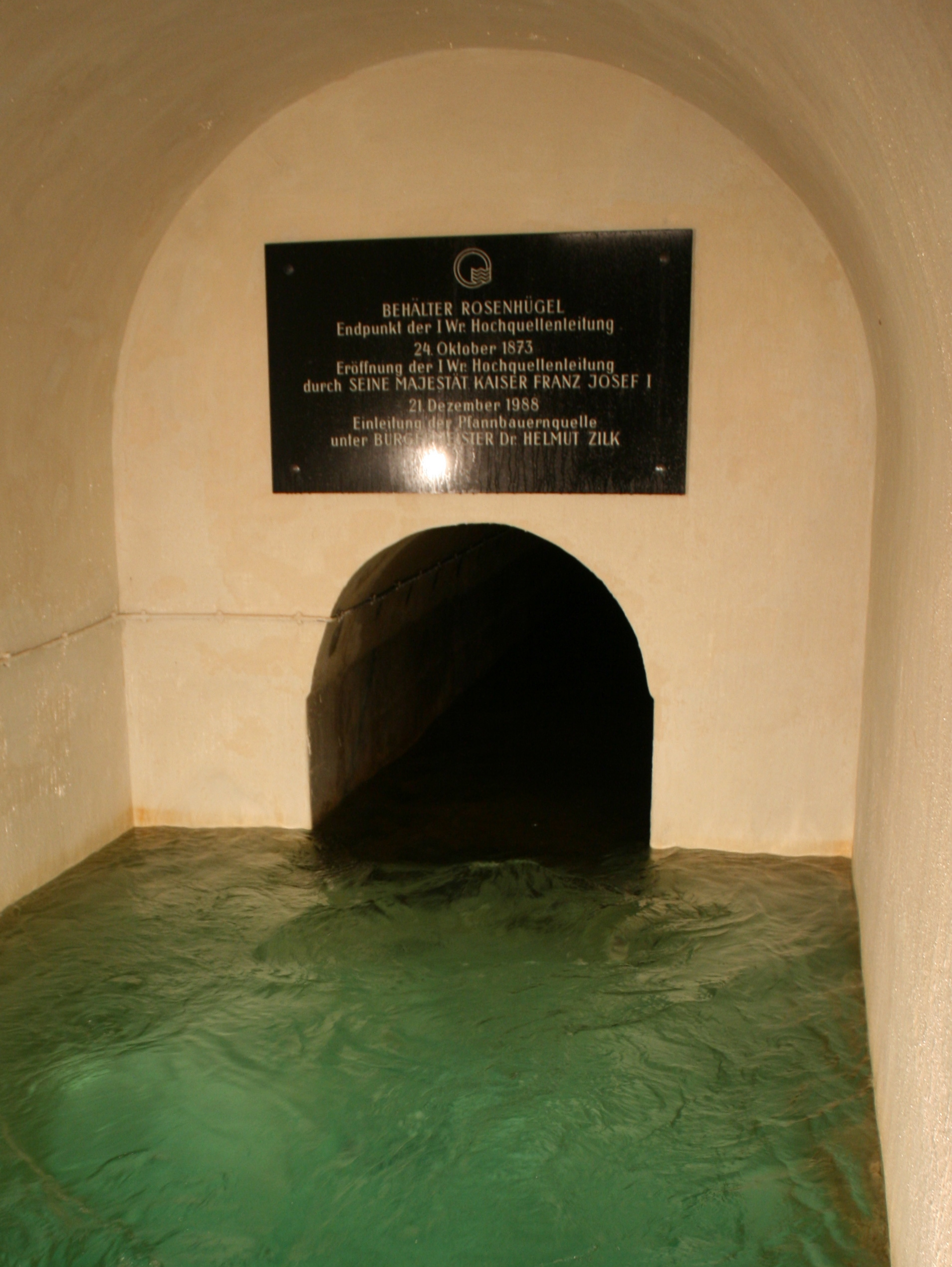 Zulauf des Behälters Rosenhügel